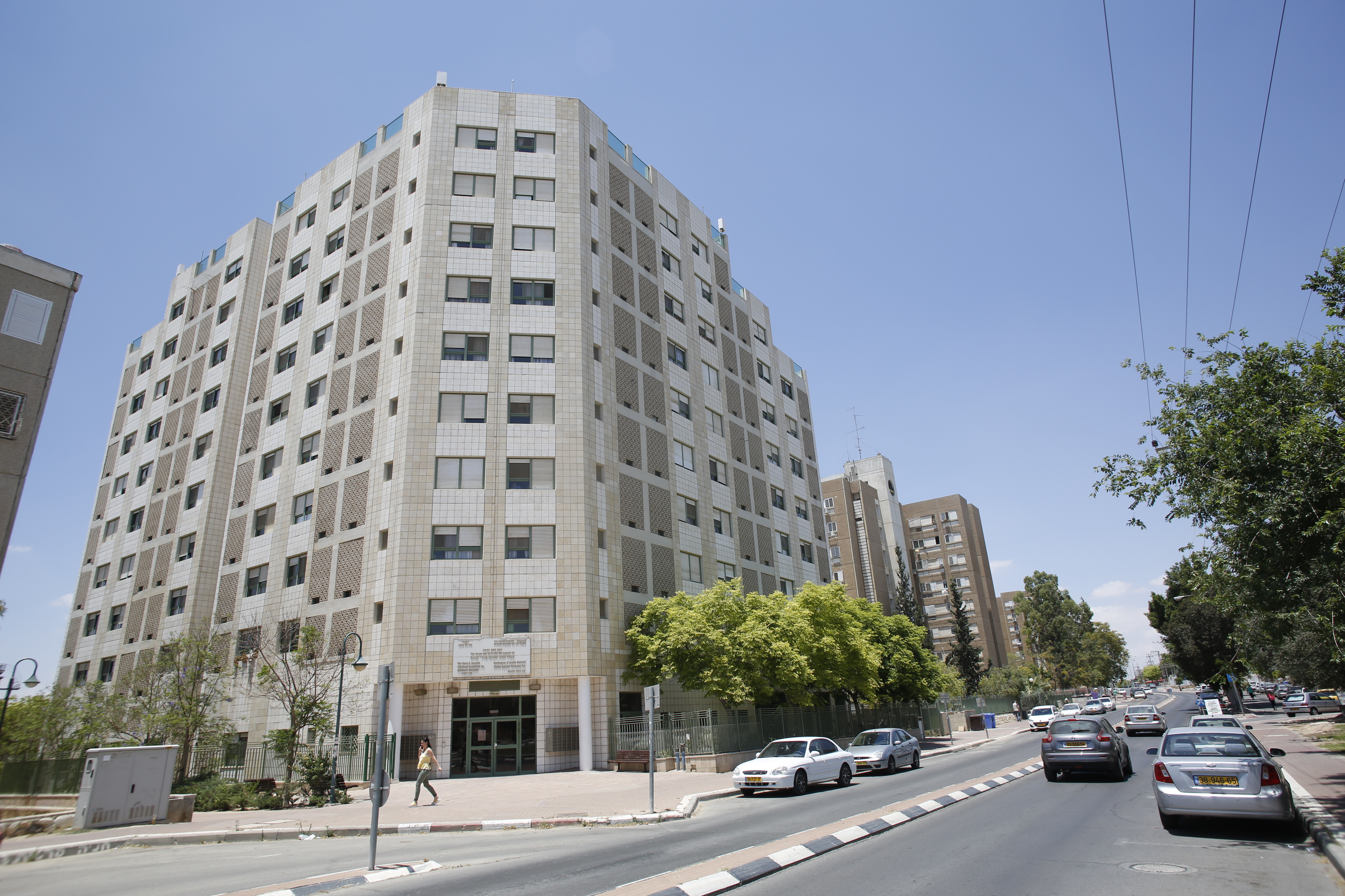 בית גיל הזהב "צור א'" בבאר שבע